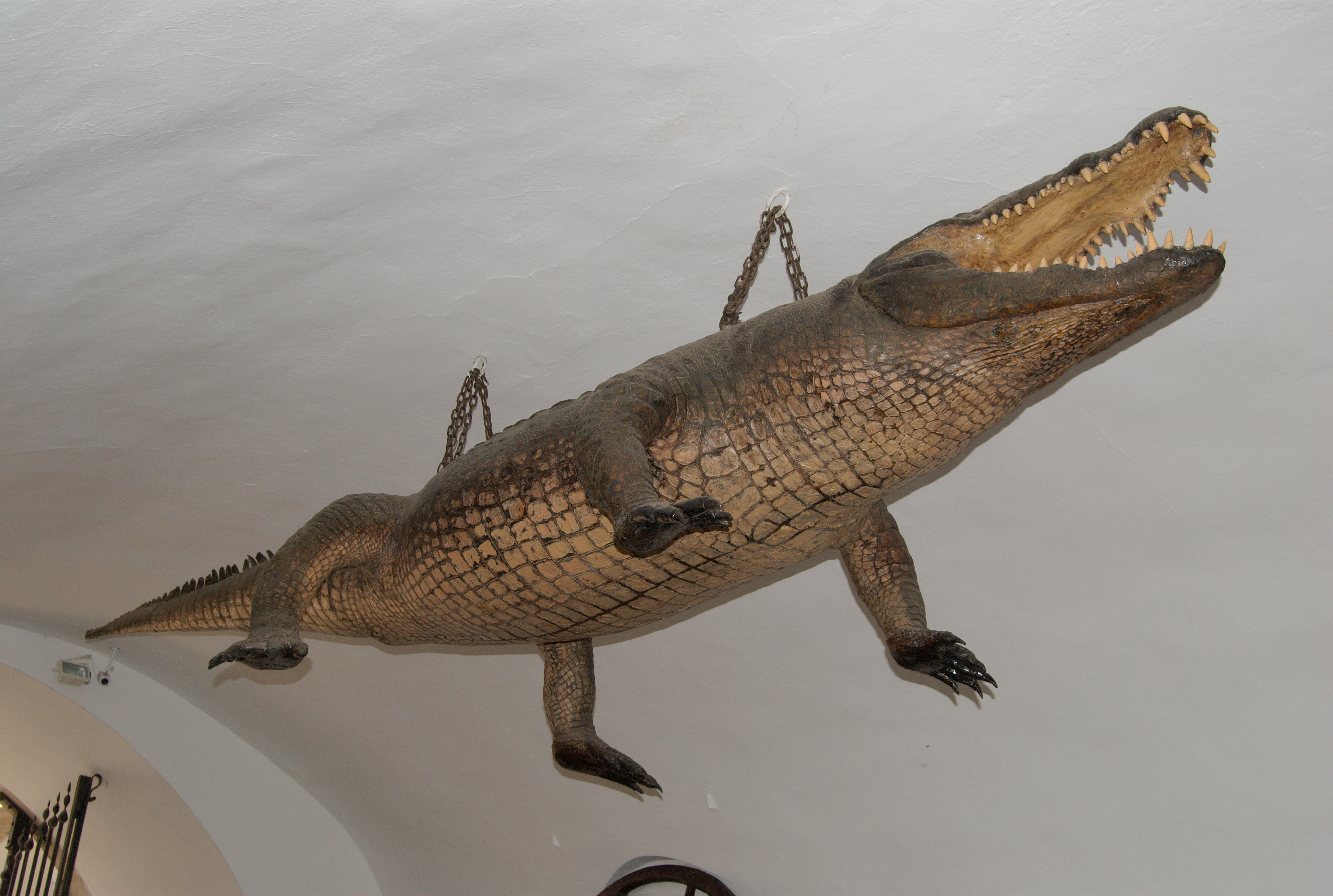 tzv. "Brněnský drak" na stropě v průjezdu Staré radnice v Brně